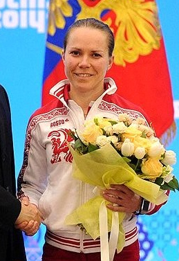 Медалью ордена «За заслуги перед Отечеством» первой степени награждена двукратный бронзовый призёр Олимпийских игр в скоростном беге на коньках Ольга Граф.